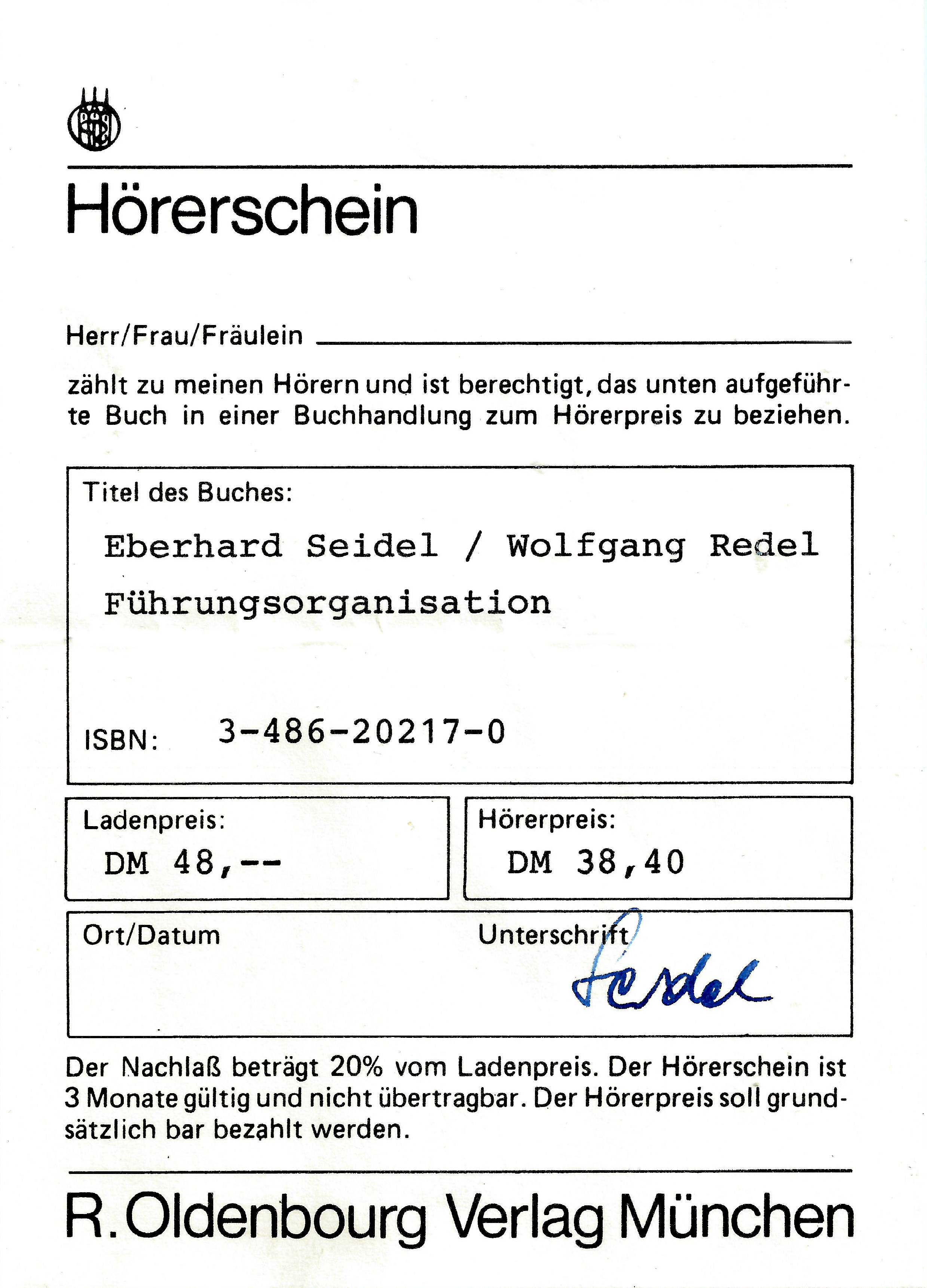 Hörerschein Eberhard Seidel - Wolfgang Redel - Führungsorganisation, R. Oldenbourg Verlag München